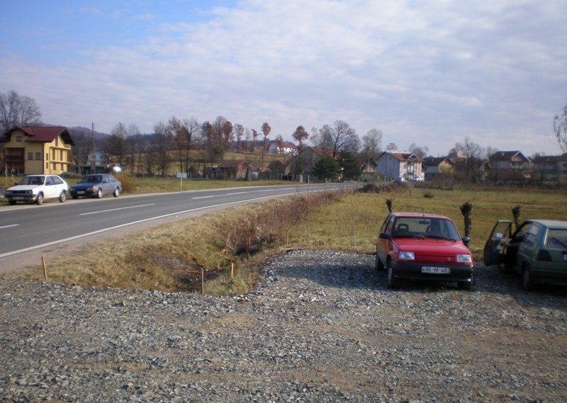 Parking